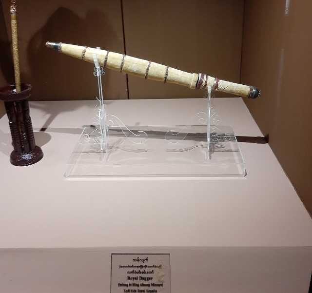 မြန်မာဘာသာ: သန်လျက် ဆိုသည်မှာ ရှေးအခါက မြန်မာဘုရင်များ ကိုင်စွဲရသော လက်နက်၊ မင်းဆောင်မင်းယောင် မင်းခမ်းမင်းနားများတွင် အသုံးပြုရသော လက်နက်ဖြစ်သည်။